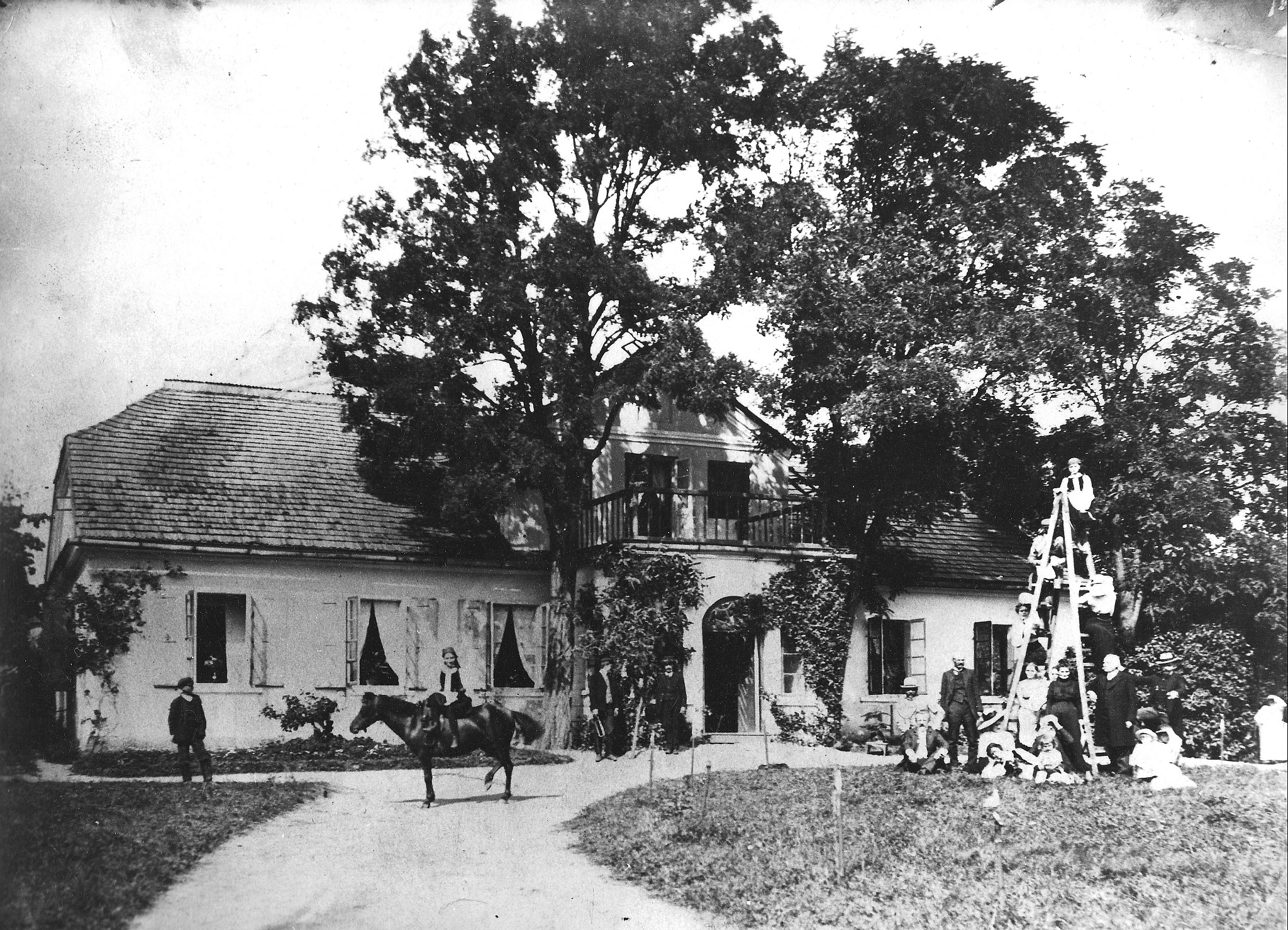 Dwór Wietrzykowskich w Cerekwi k. Radomia (budynek obecnie już nie istnieje)